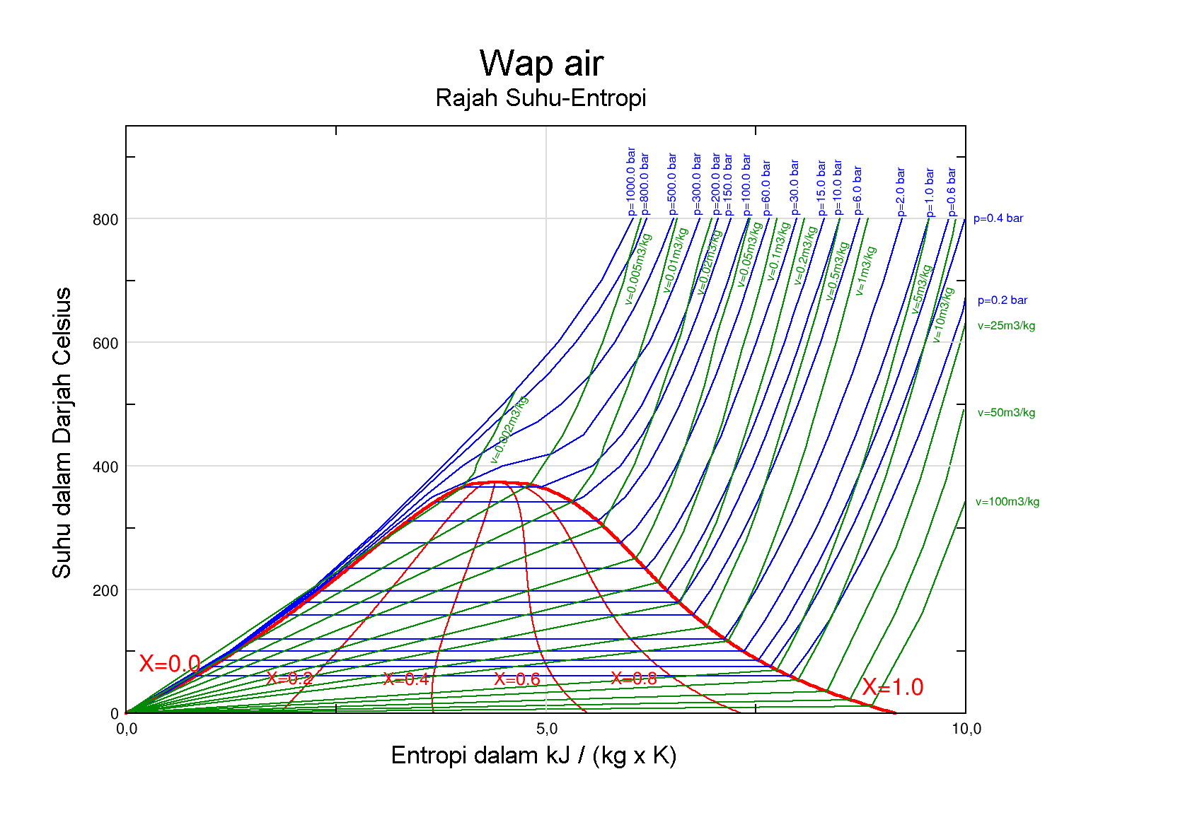 Gambar rajah fasa bagi suhu melawan entropi tentu untuk air/wap. Luas bawah kubah merah, cecair air dan wap saling wujud dalam keseimbangan. Takat genting berada pada puncak kubah tersebut. Air berada di kiri manakala wap berada di kanan. Garis biru adalah isobar yang menunjukkan tekanan malar. Garis hijau adalah isochor menunjukkan isi padu tentu yang malar. Garis merah pula menunjukkan kualiti yang sama.